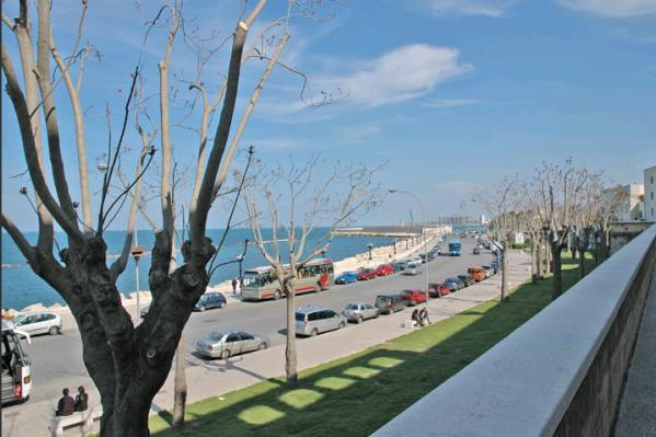 Visuale di uno scorcio del Lungomare Imperatore Augusto a Bari. Licensing Immagine tratta dal sito Bari.live. Autorizzazione all'uso concessa, previa citazione della fonte. OTRS #2007062110004343.